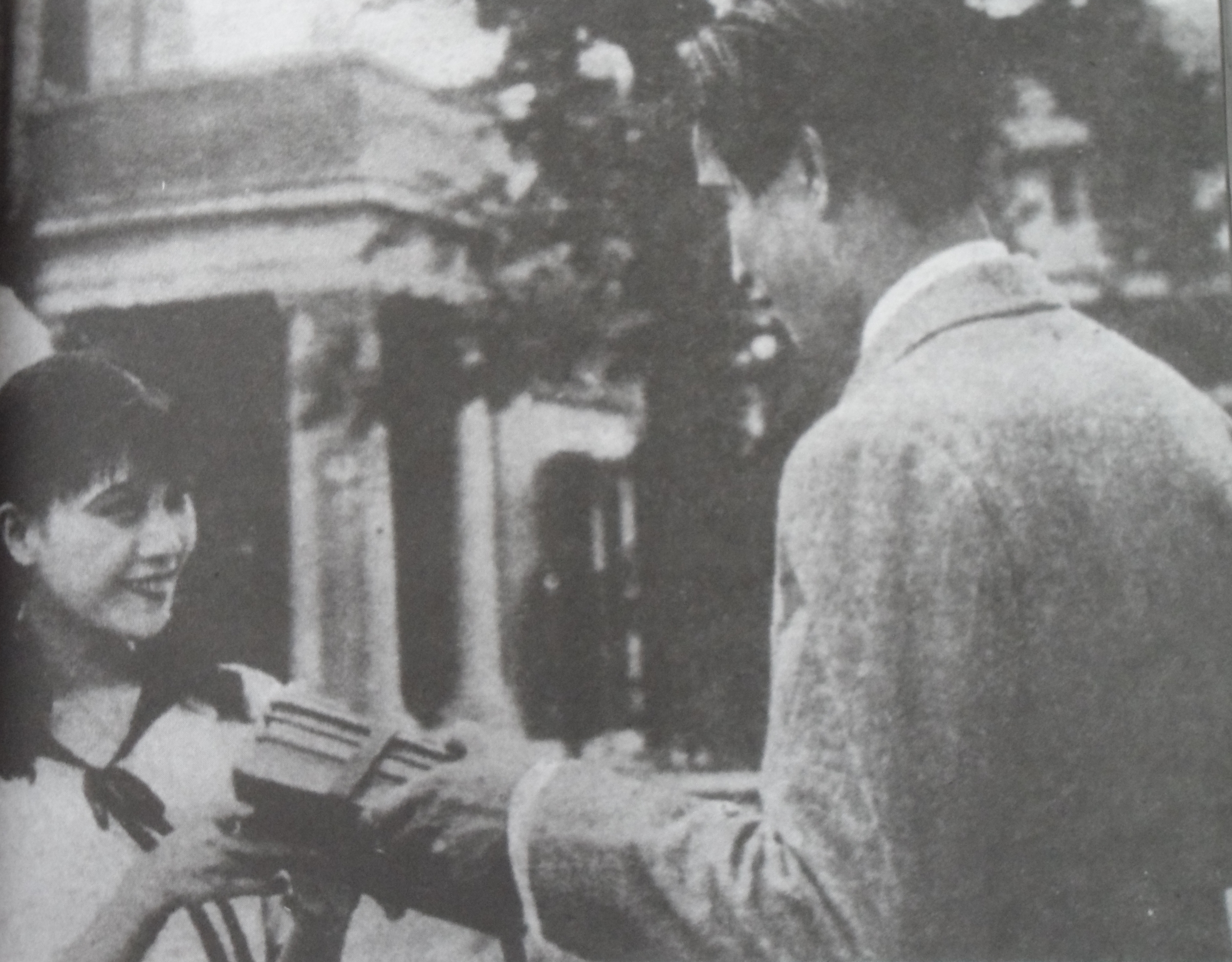 恋爱与义务剧照